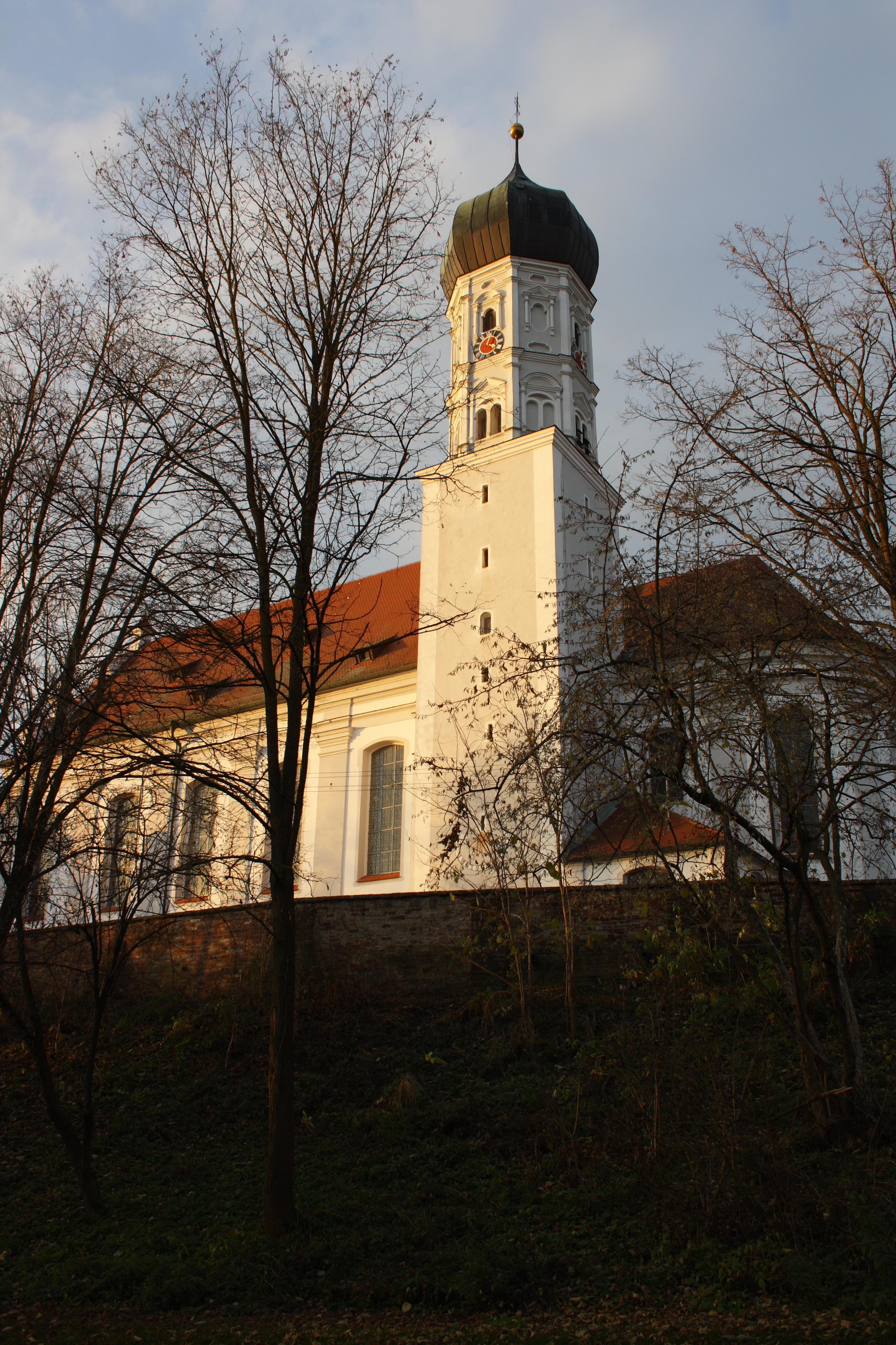 Ehemalige Damenstiftskirche, katholische Pfarrkirche St. Johannes Baptist und Johannes Evangelist in Edelstetten in der Gemeinde Neuburg an der Kammel im Landkreis Günzburg (Bayern), Südfassade und Turm